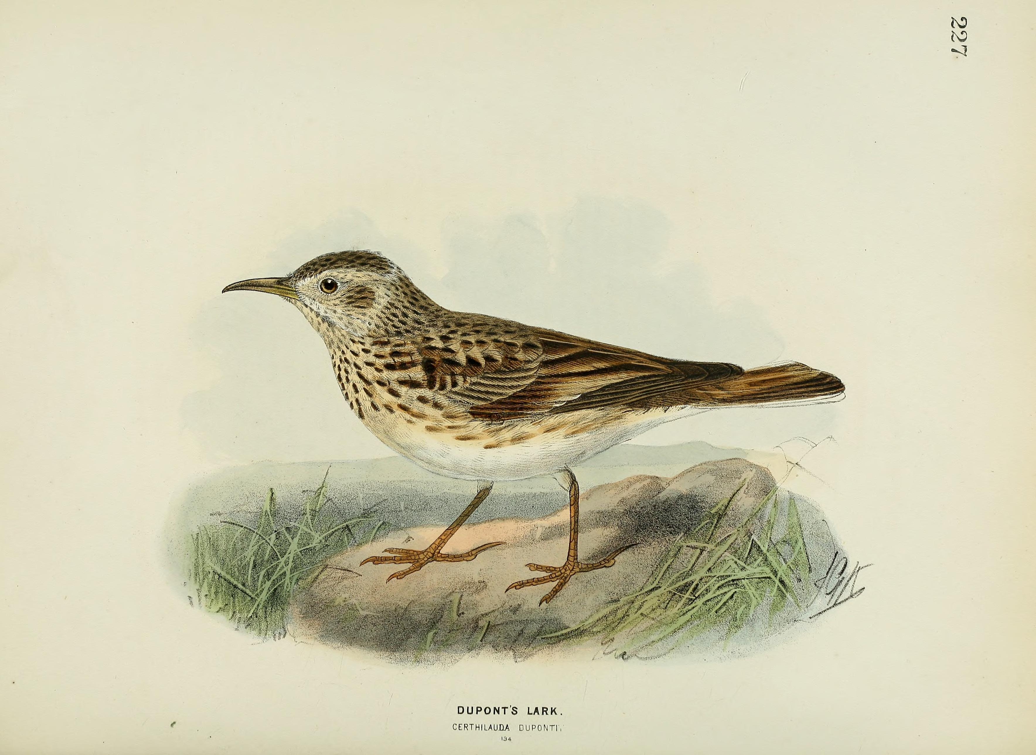 Dupont's Lark Chersophilus duponti